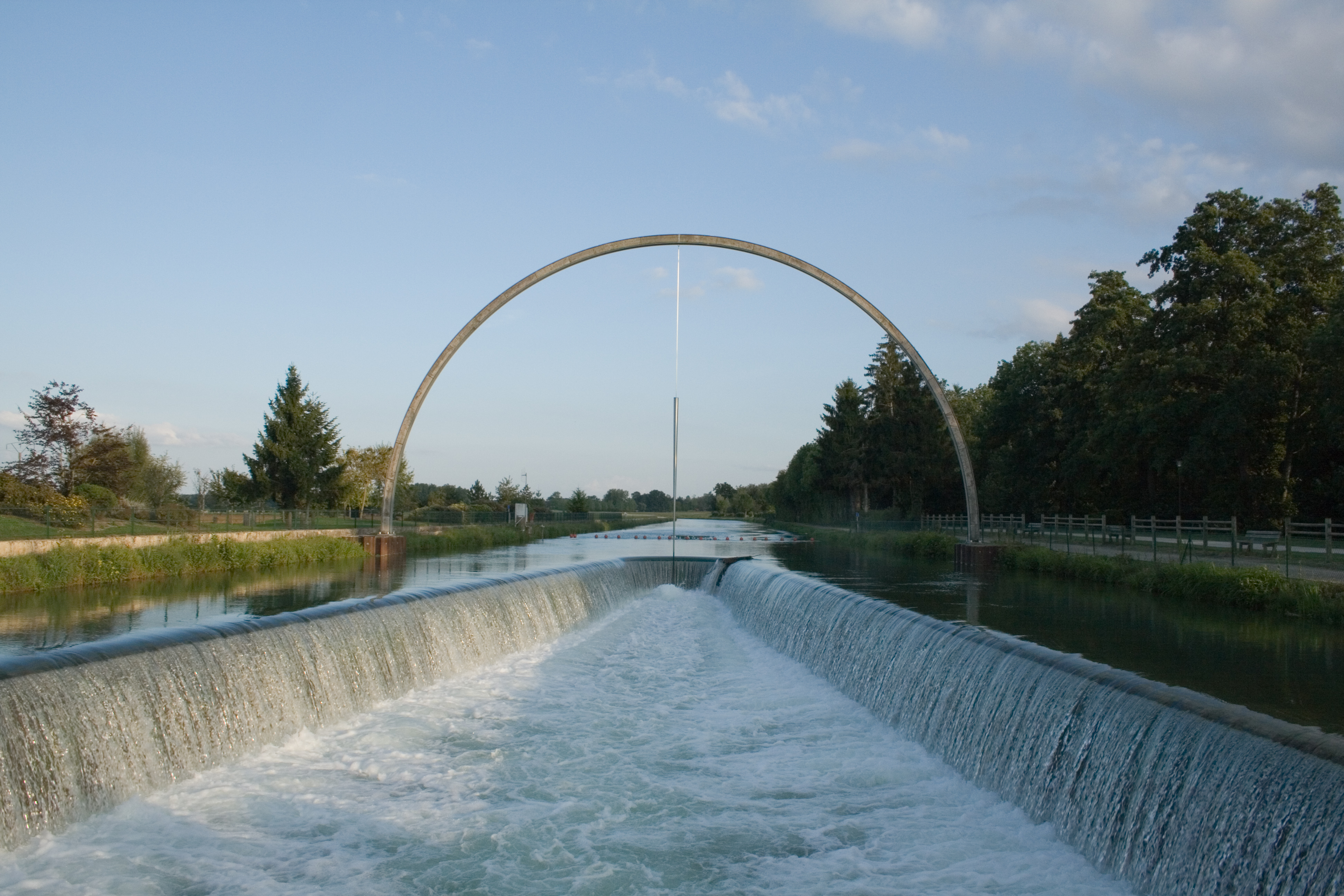 Sculpture Rimke à Lusigny-sur-Barse